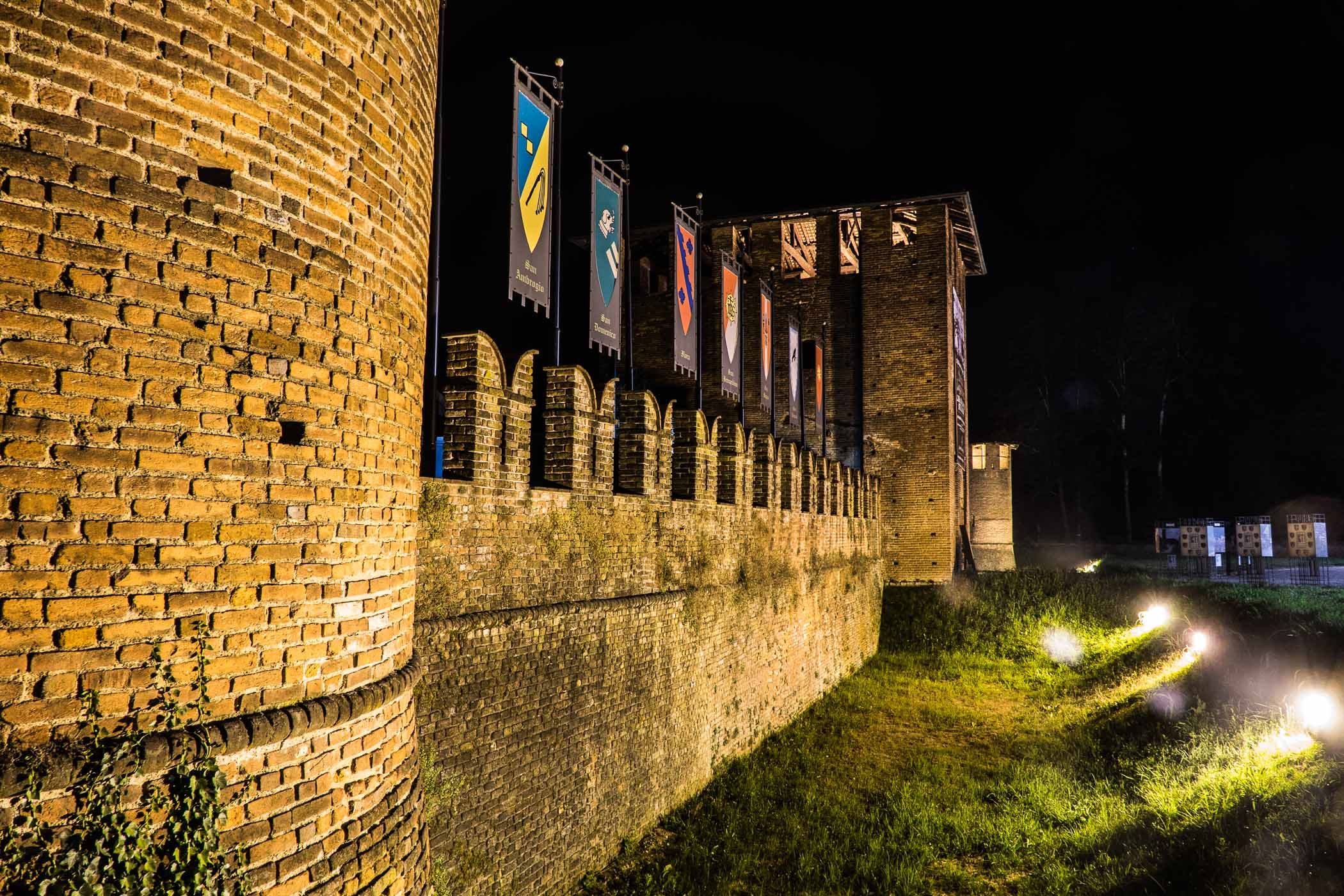 Castello Visconteo - Vista Notturna - Legnano This is a photo of a monument which is part of cultural heritage of Italy.